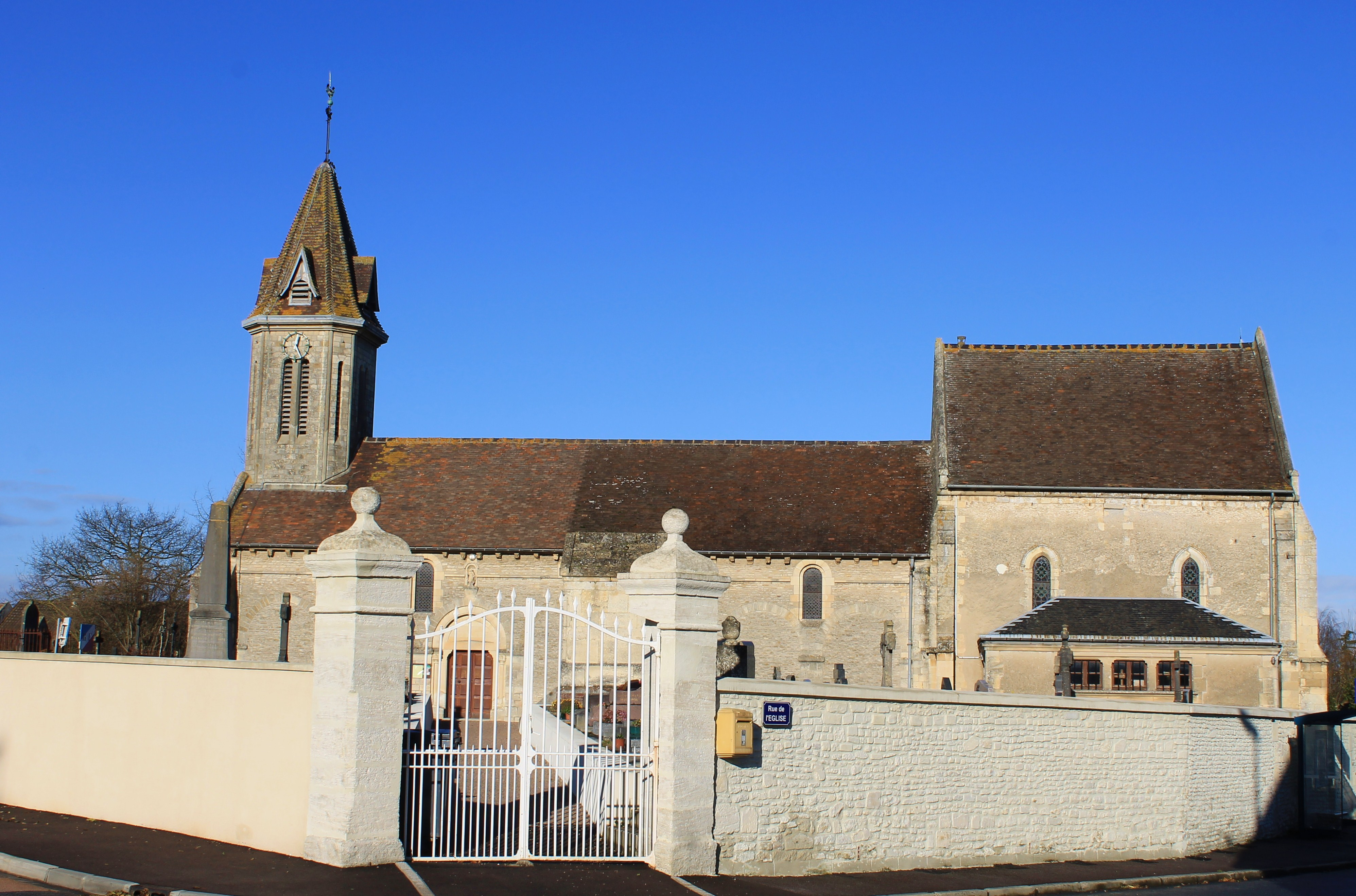 Église St Aubin à Saint-Aubin-d'Arquenay (Calvados)